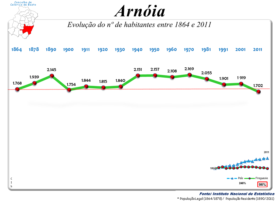 Censos 1864/2011